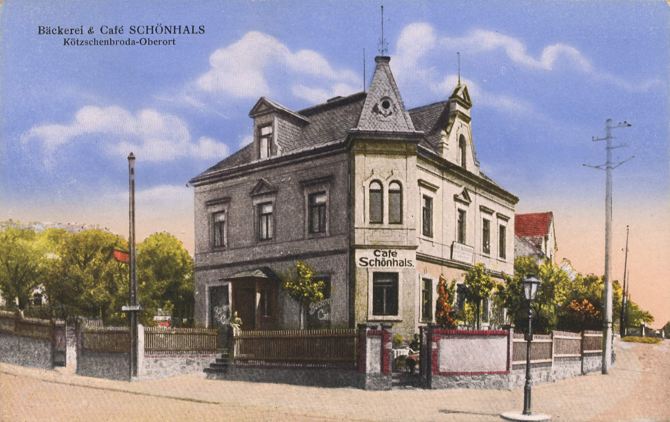 Bäckerei und Café Schönhals